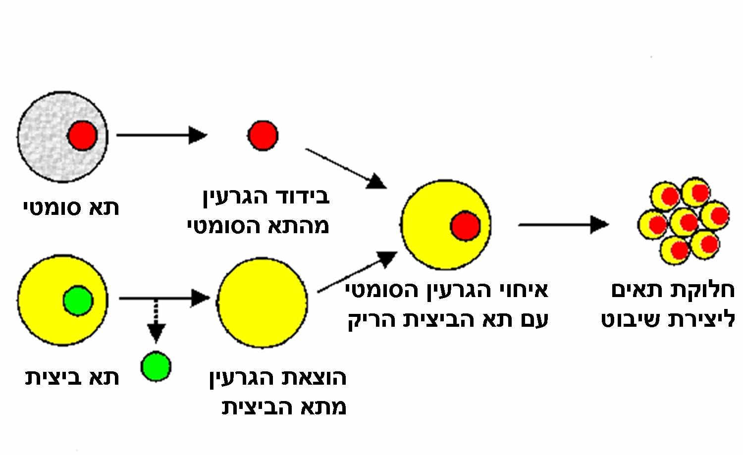 שיבוט